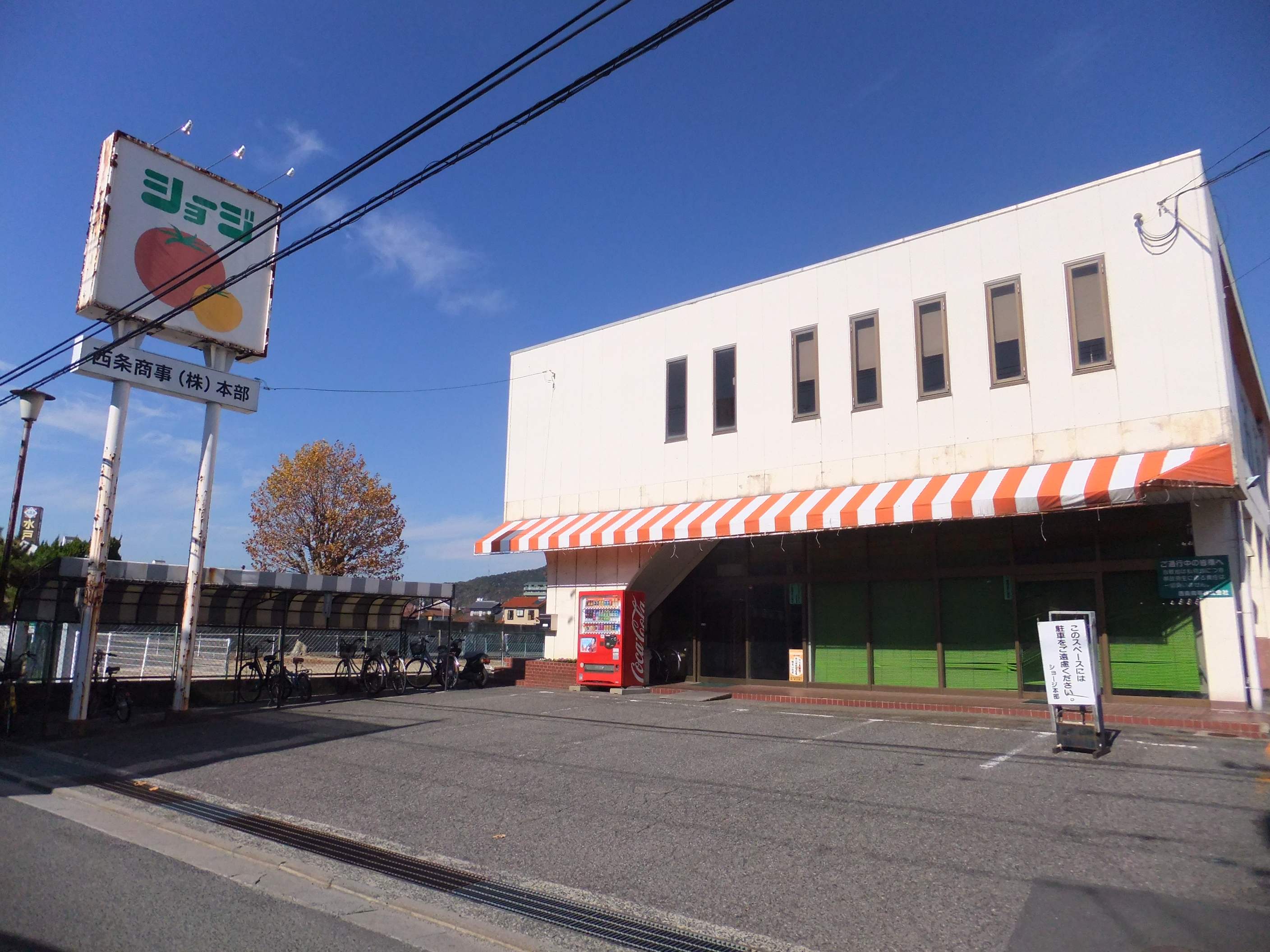 西條商事本部